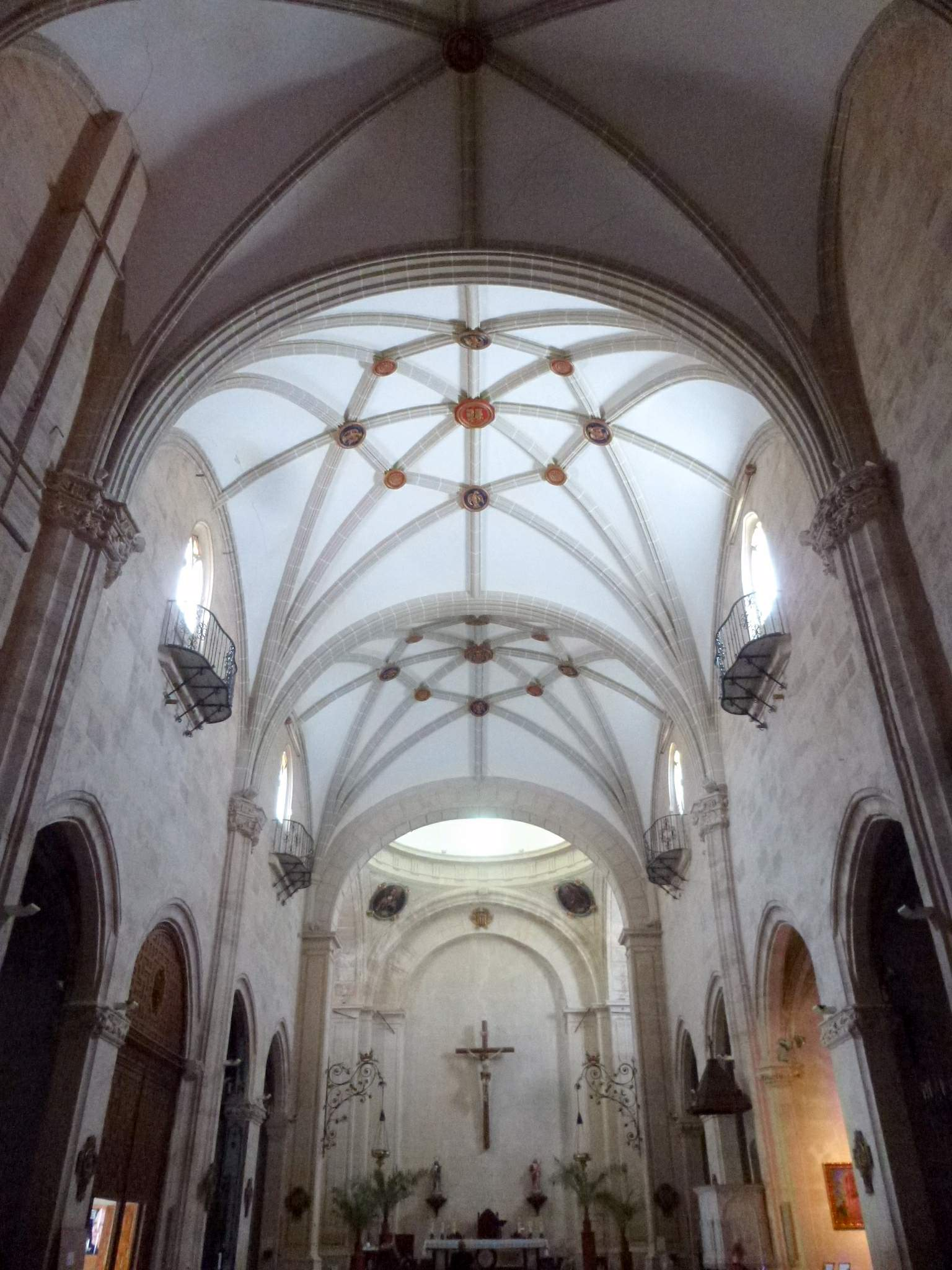 Iglesia de las Santa Justa y Rufina (Orihuela, Alicante)